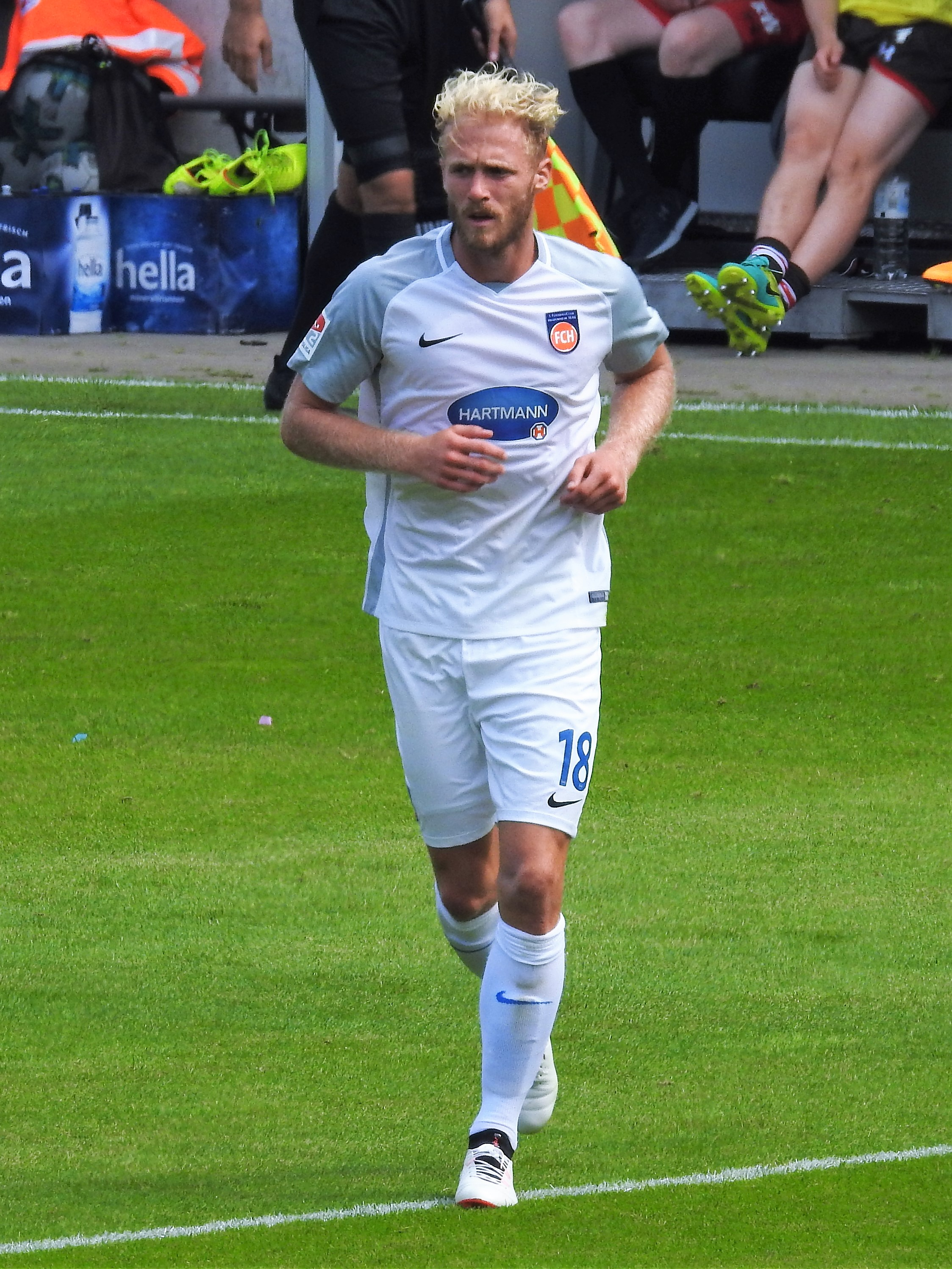 Sebastian Griesberg